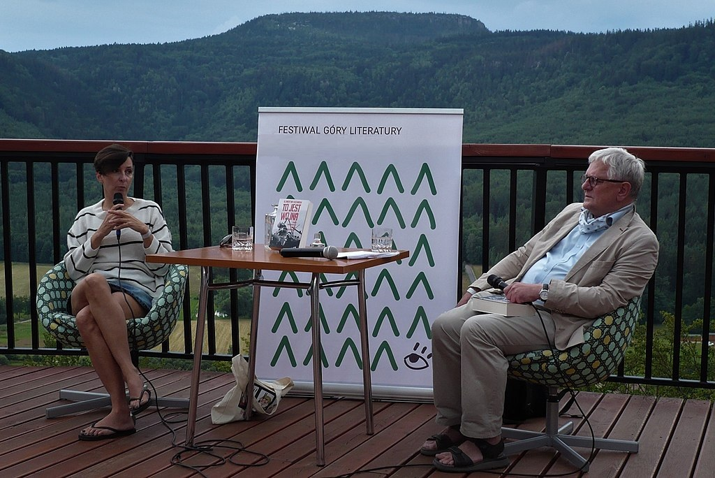 Klementyna Suchanow i Grzegorz Gauden, VI Festiwal Góry Literatury, Radków, taras na Górze Guzowatej, 15.07.2020